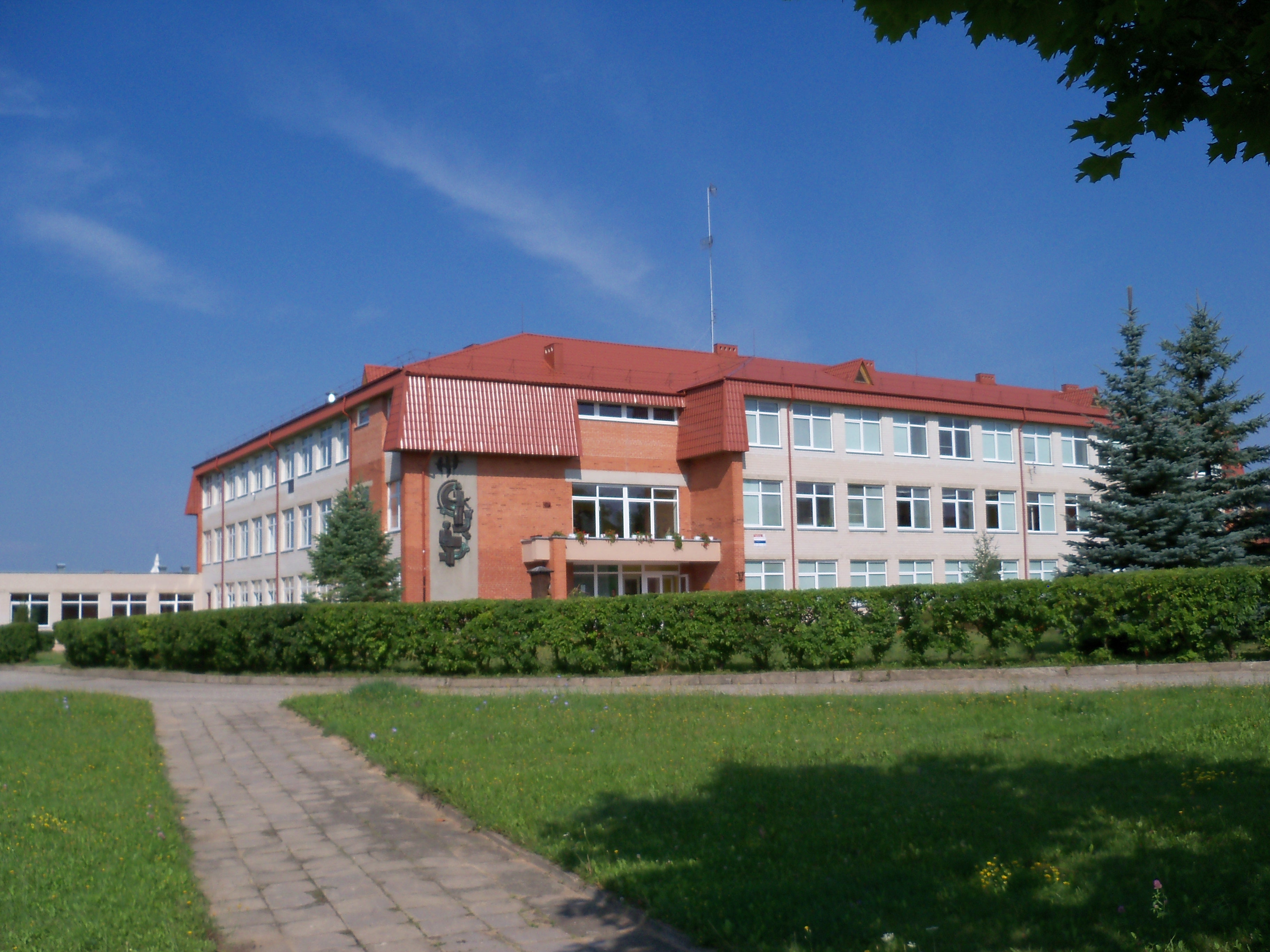 Kupiškio rajono Noriūnų Jono Čeriniasu pagrindinė mokykla